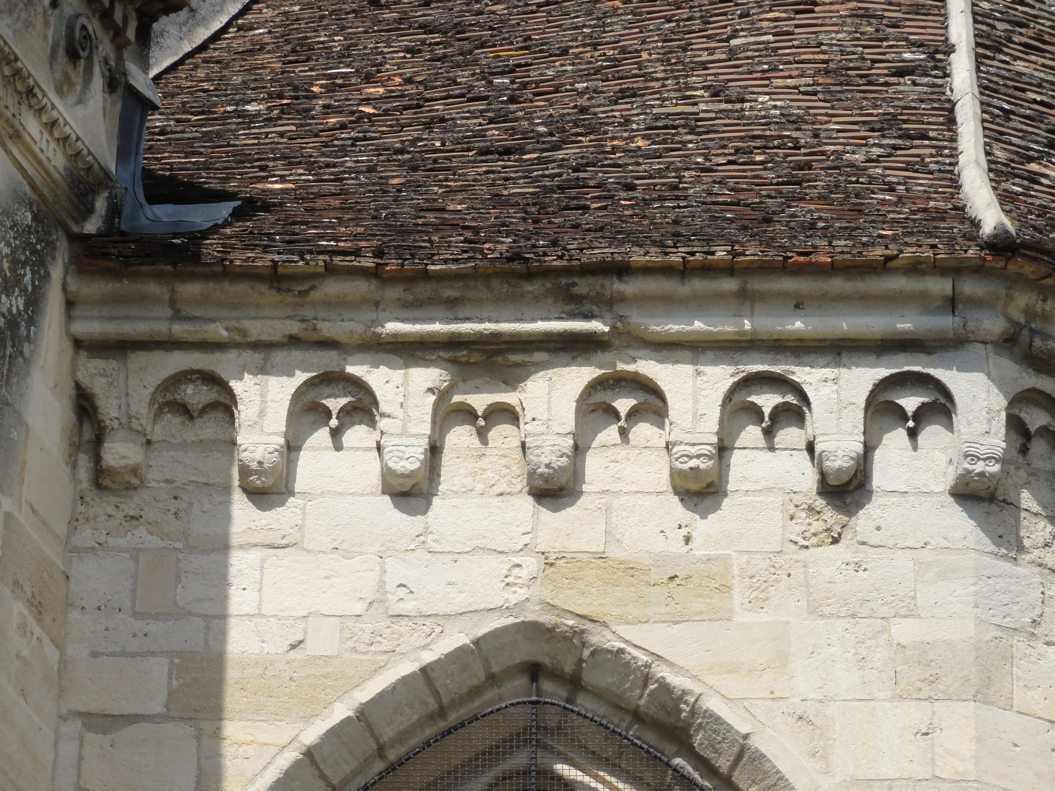 Église Notre-Dame-de-l'Assomption d'Auvers-sur-Oise - voir titre.